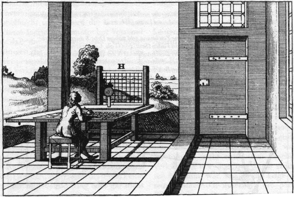 Raum in deutlicher Zentralperspektive, mit einer Vorrichtung zum perspektivischen Zeichnen einer Landschaft. Diese wurde vom 16. bis zum 18. Jahrhundert zum perspektivisch richtigen Abbilden verwendet.